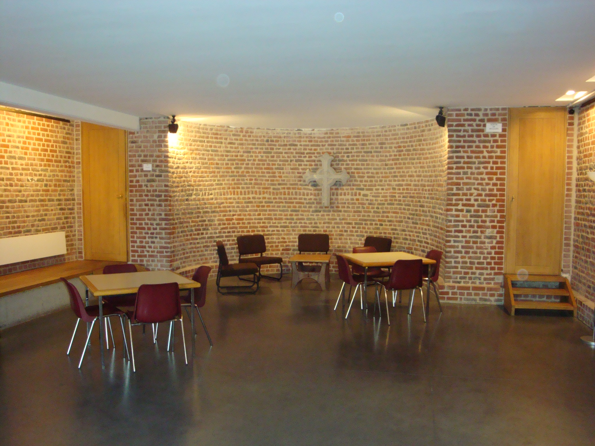 Chapelle de la Résurrection - Verrijzeniskapel, rue Van Maerlantstraat 22-24, B-1040 Brussel Bruxelles, Foyer (Rez-de-chaussée)